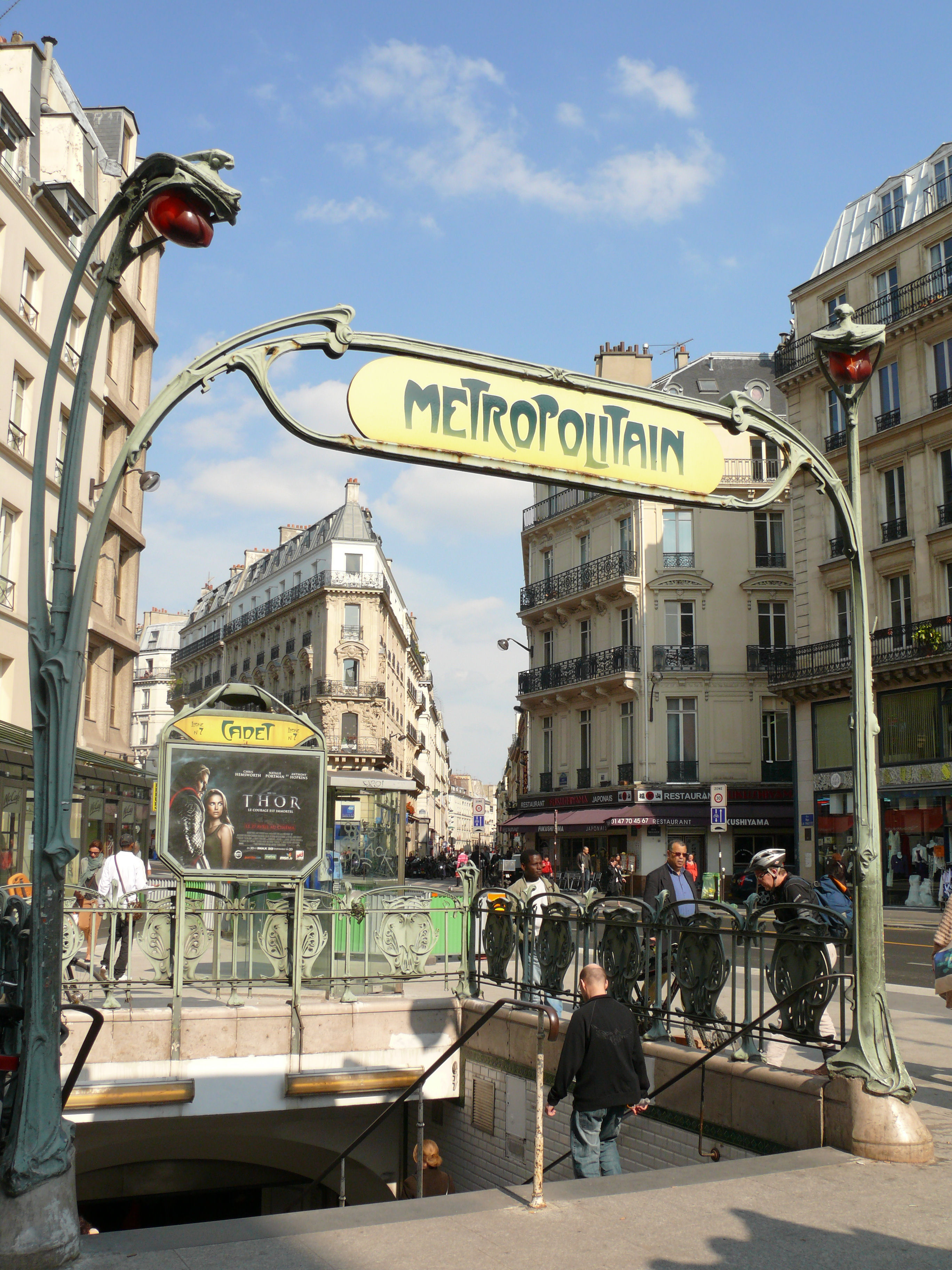 Paris 9ème arrondissement - Edicule Guimard de la station Cadet. Le panneau d'affichage arbore une publicité pour le film Thor.